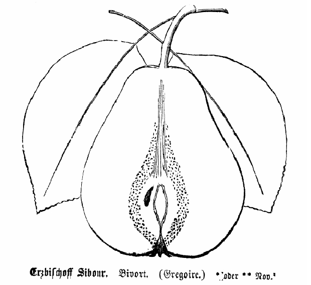 Schnittbild der Birne Erzbischof Sibour